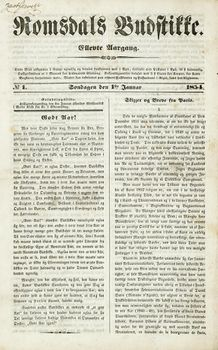 Romsdals Budstikke, 1854